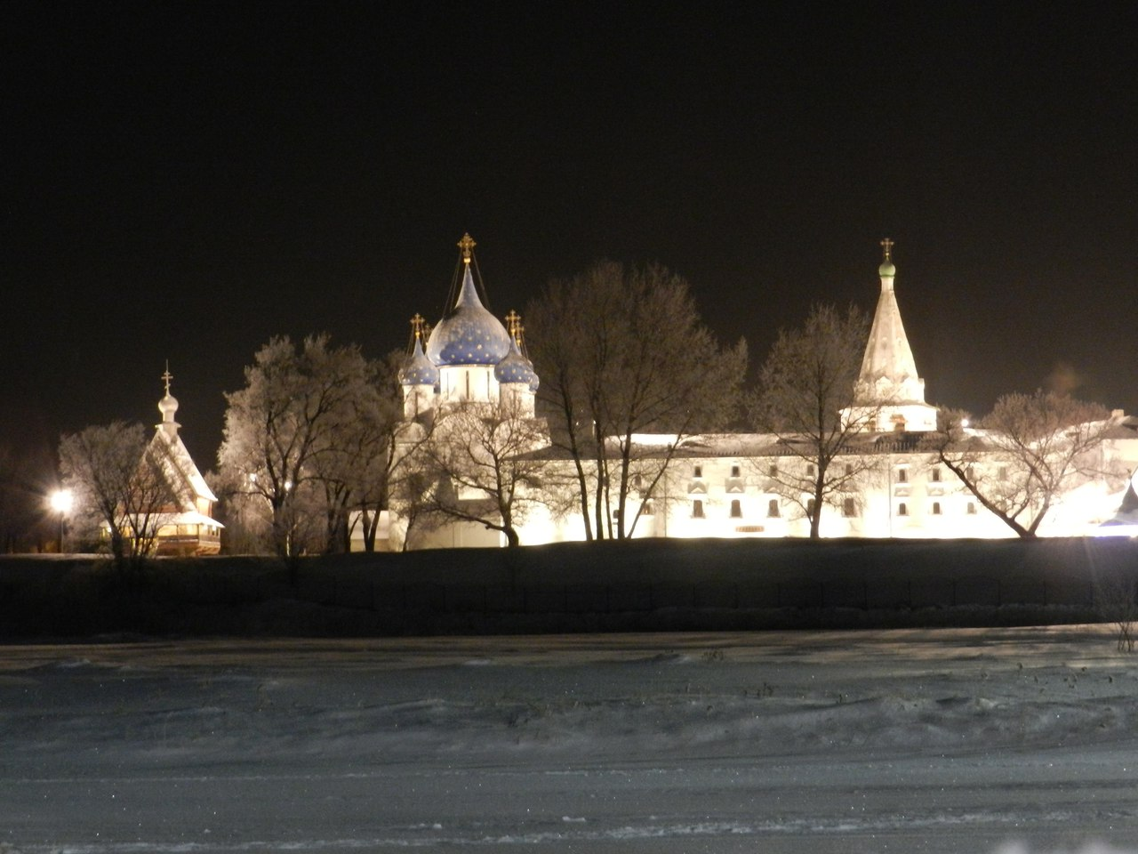 Суздальский Кремль зимней ночью